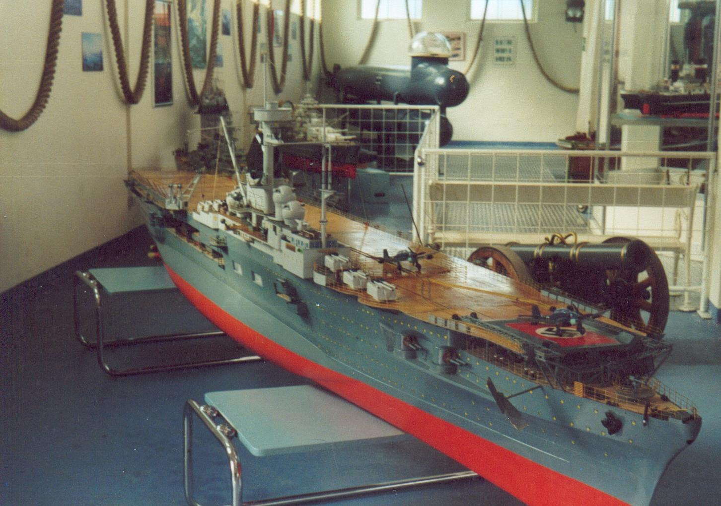 Modell Flugzeugträger Graf Zeppelin,Techn.Museum Speyer